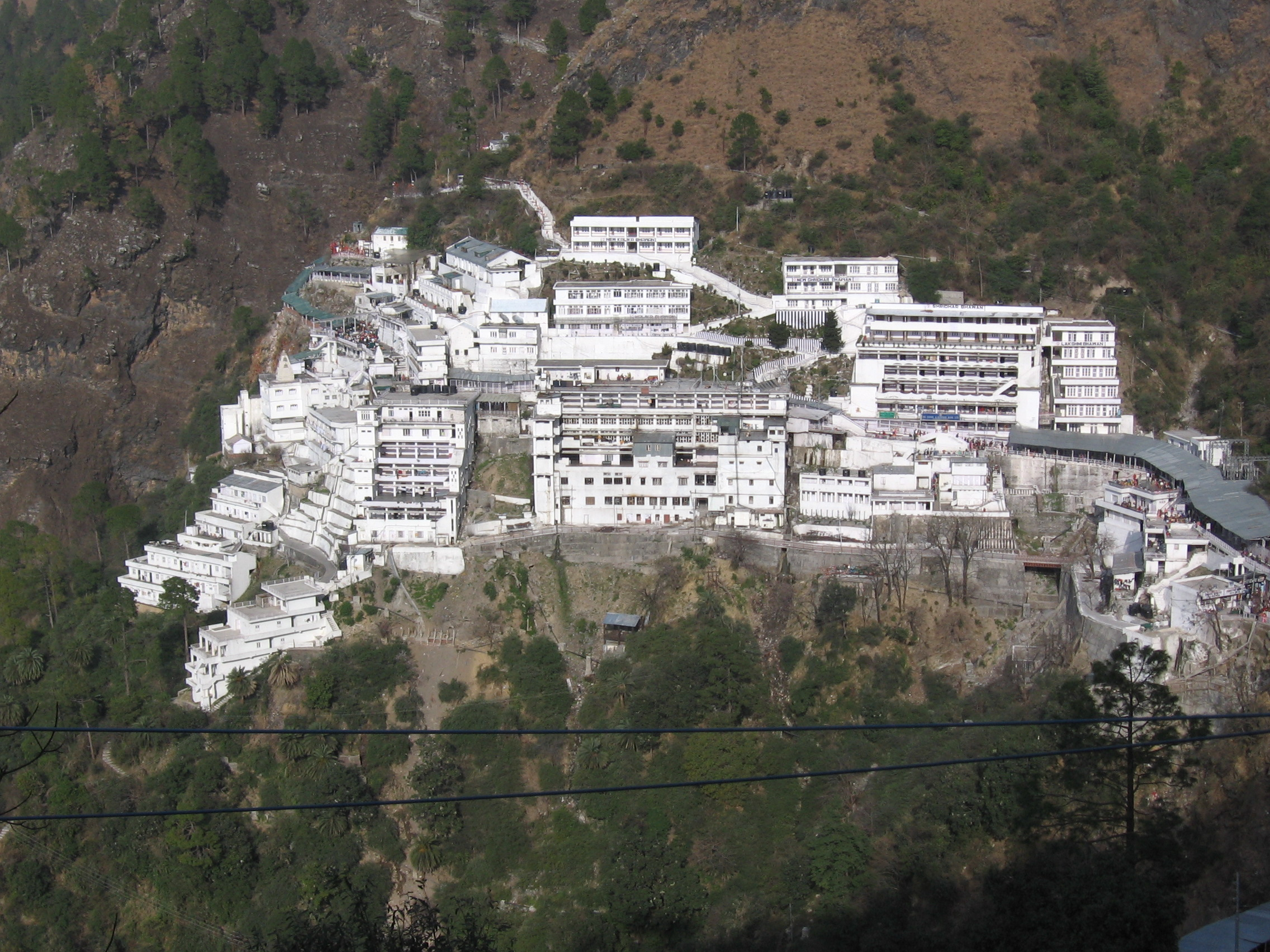 Vaishno Devi Havana